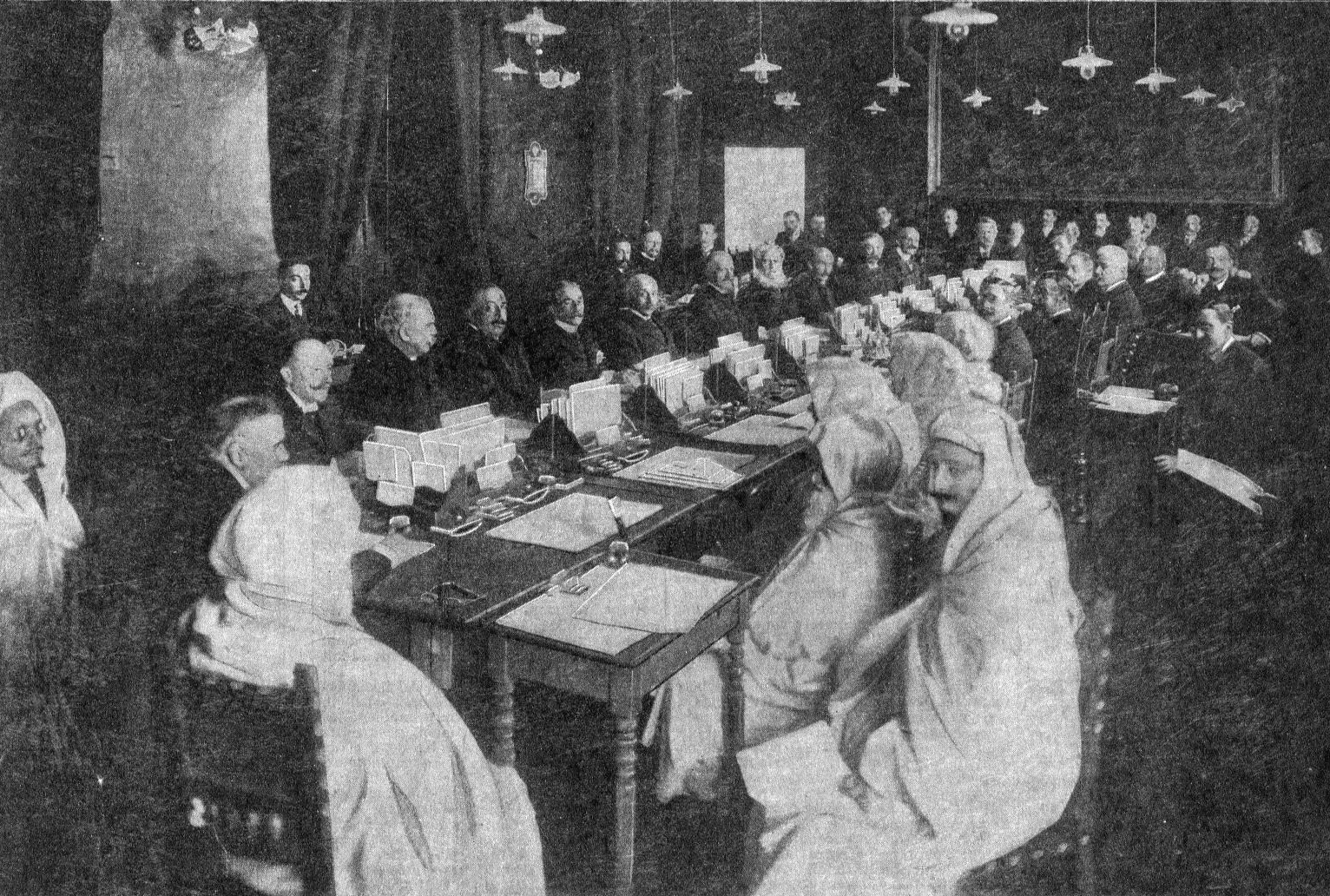 La Conférence d'Algésiras (cl. Bringer).